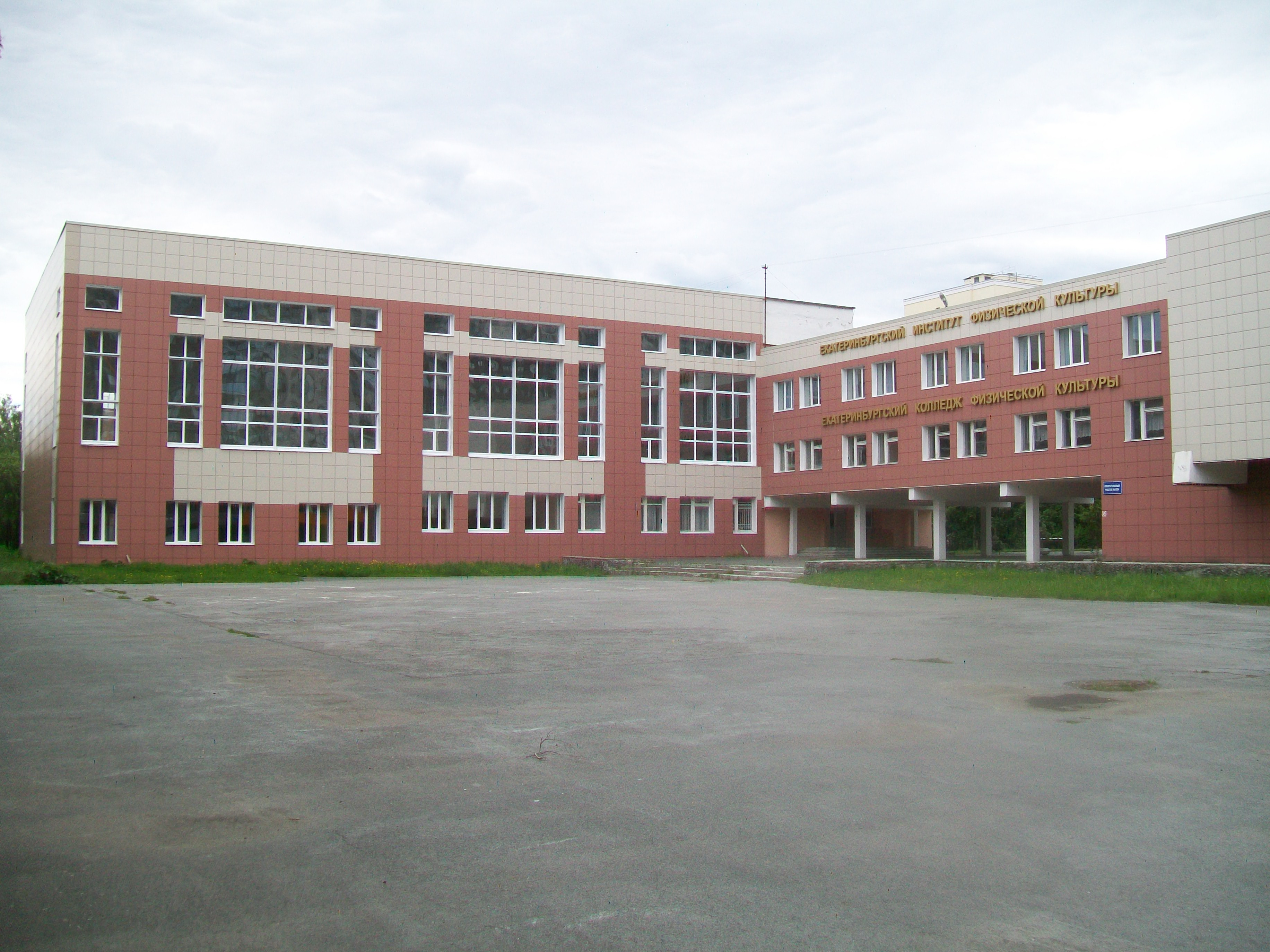 Здание филиала Уральского государственного университета физической культуры и колледжа физической культуры в Екатеринбурге. Июнь 2017 года